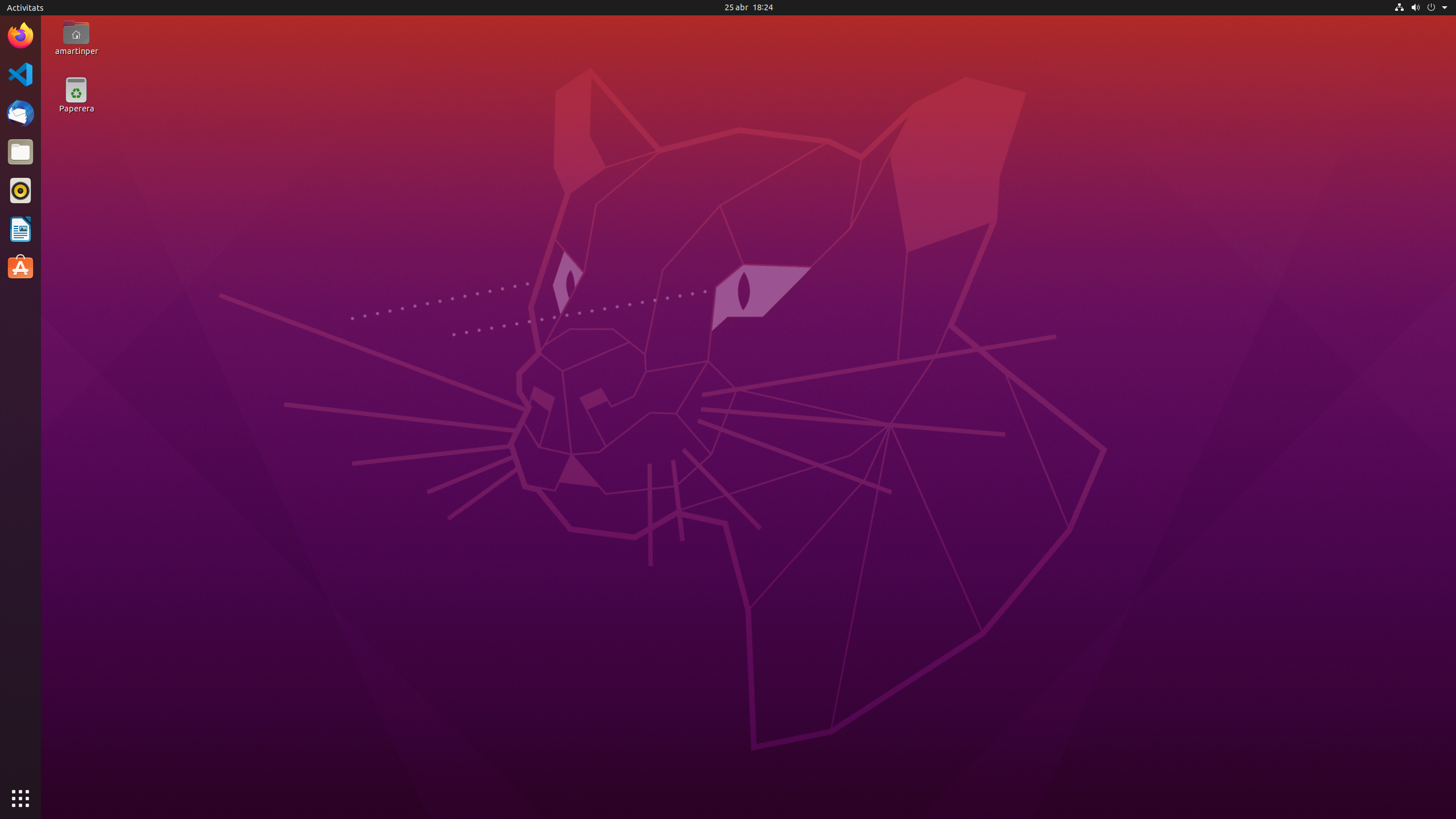 Ubuntu 20.04 en Català